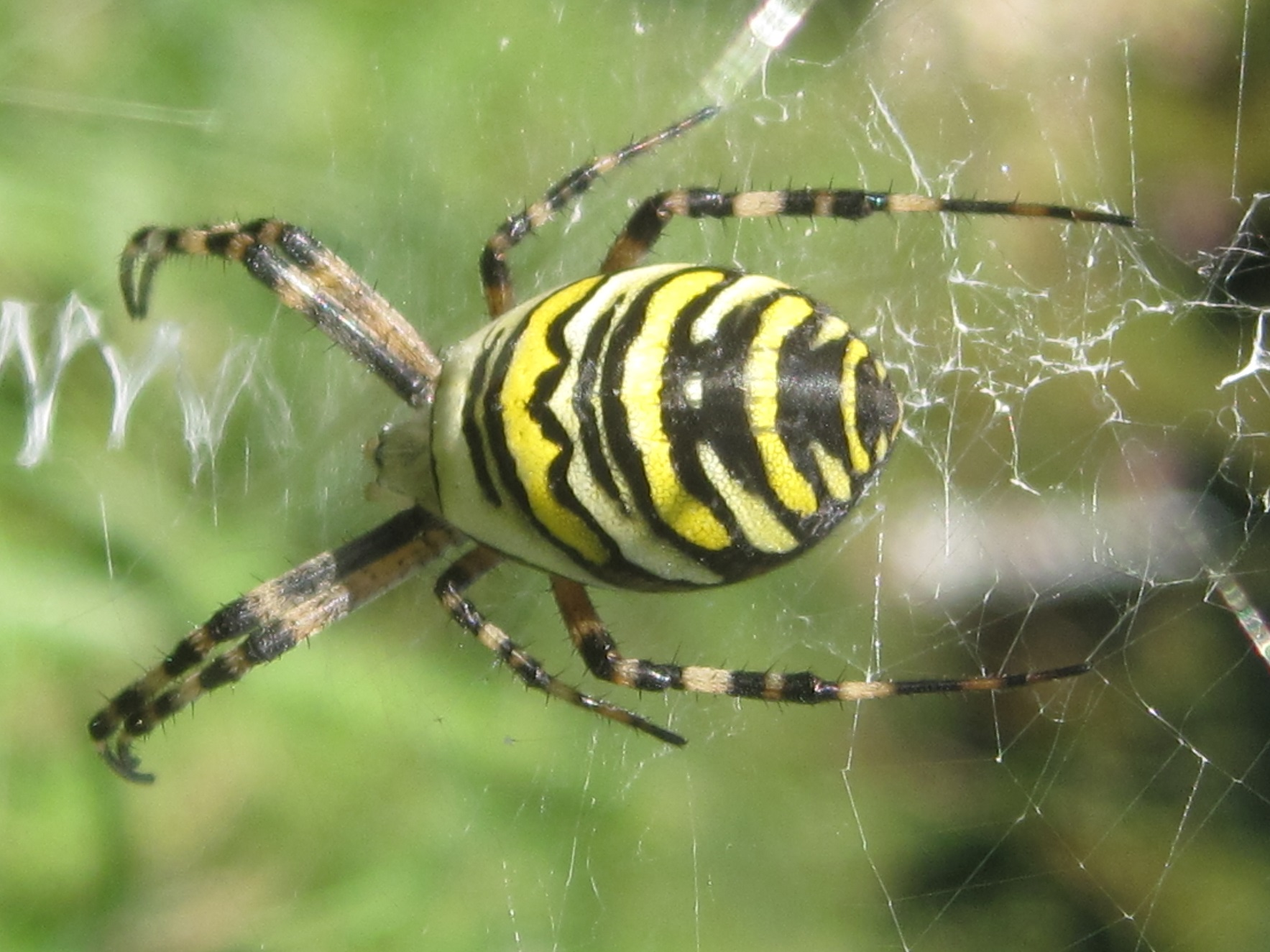 Araignée Argiope ou épeire fasciée à l'affut